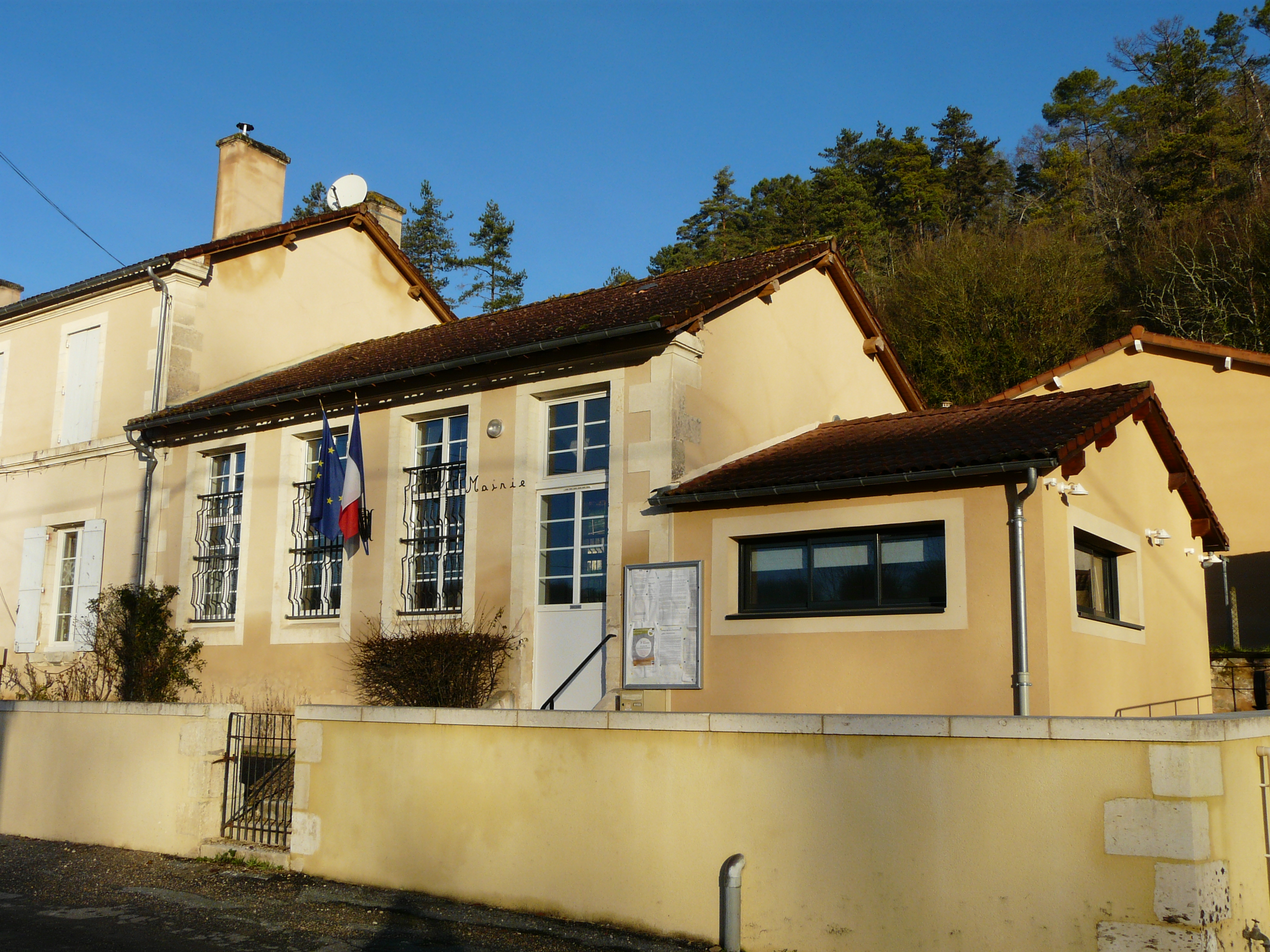 La mairie de Salon, Dordogne, France.